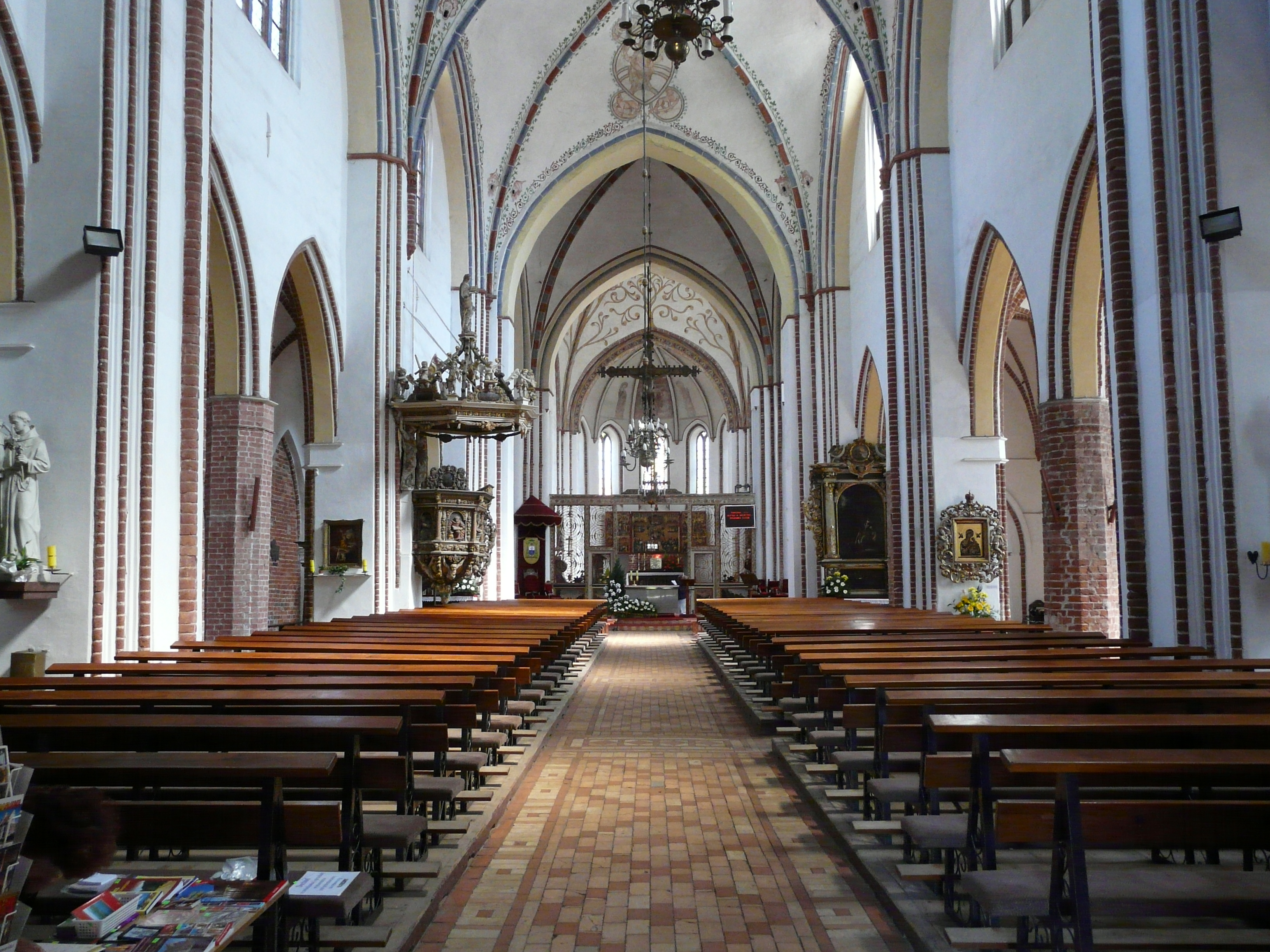 Interiér katedrály v Kamienu Pomorskiem - pohled přímo po ose střední lodě, Západopomořanské vojvodství, Polsko